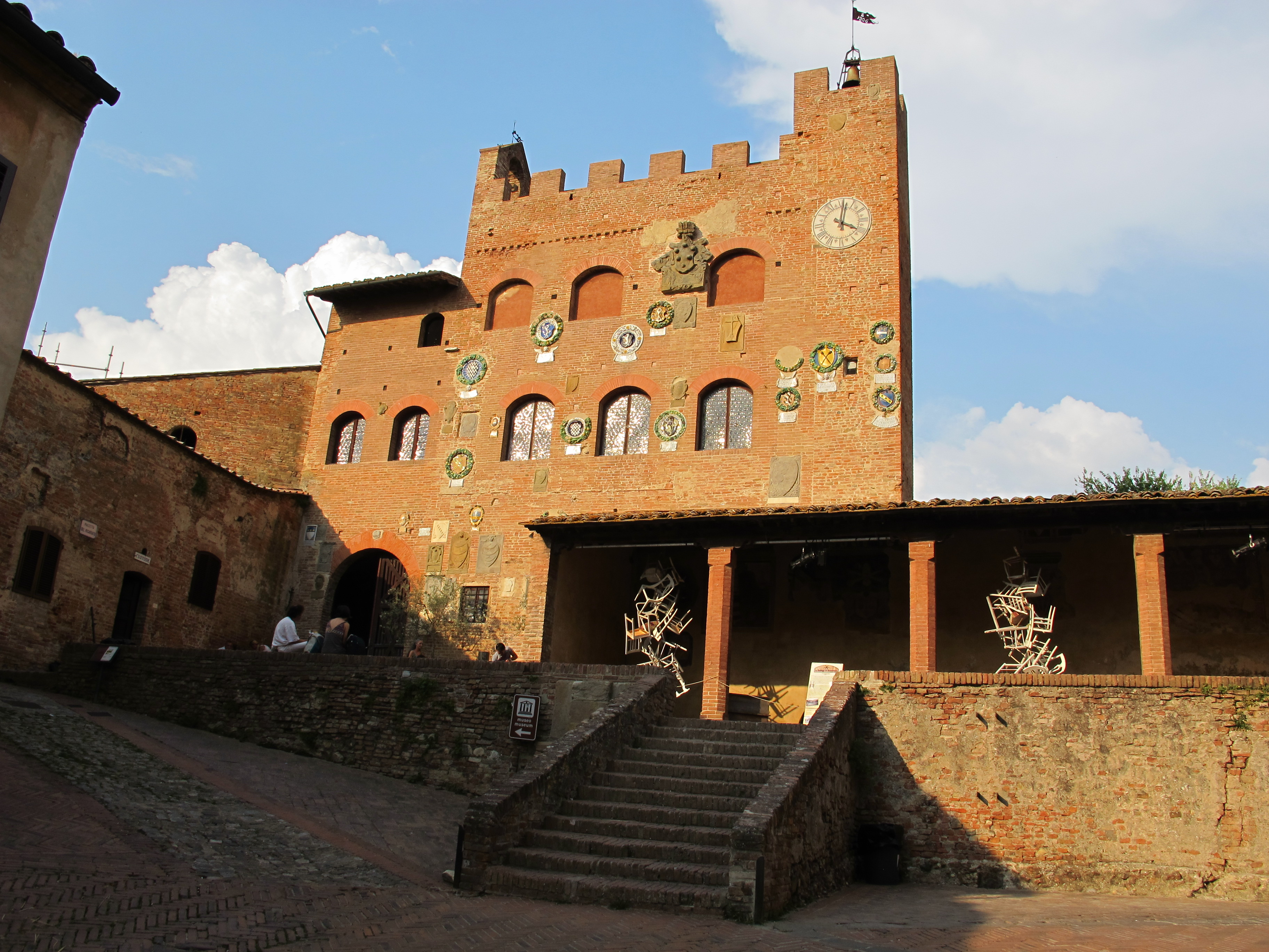 Palazzo vicariale di certaldo, facciata